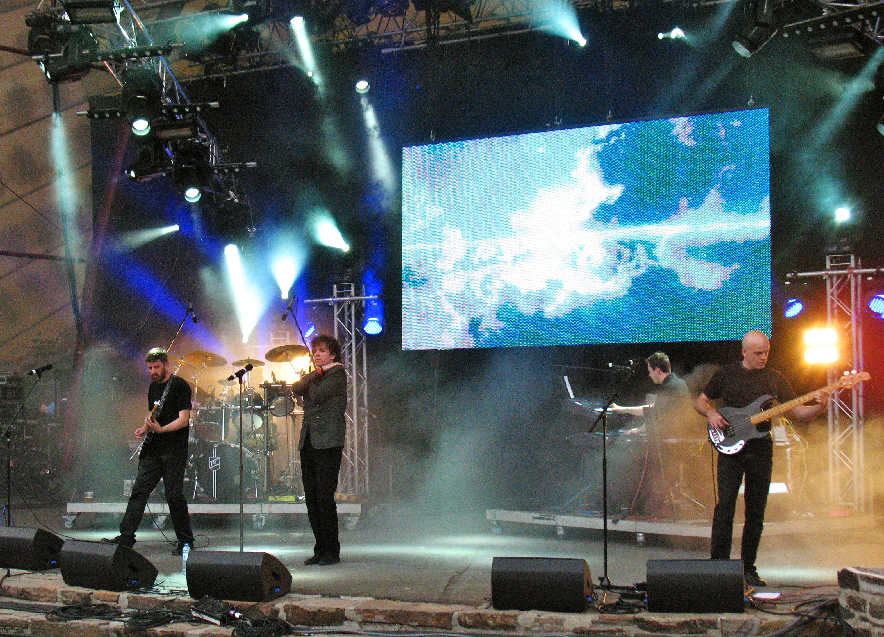 IQ durant le festival Night of the Prog le 9 juillet 2011.